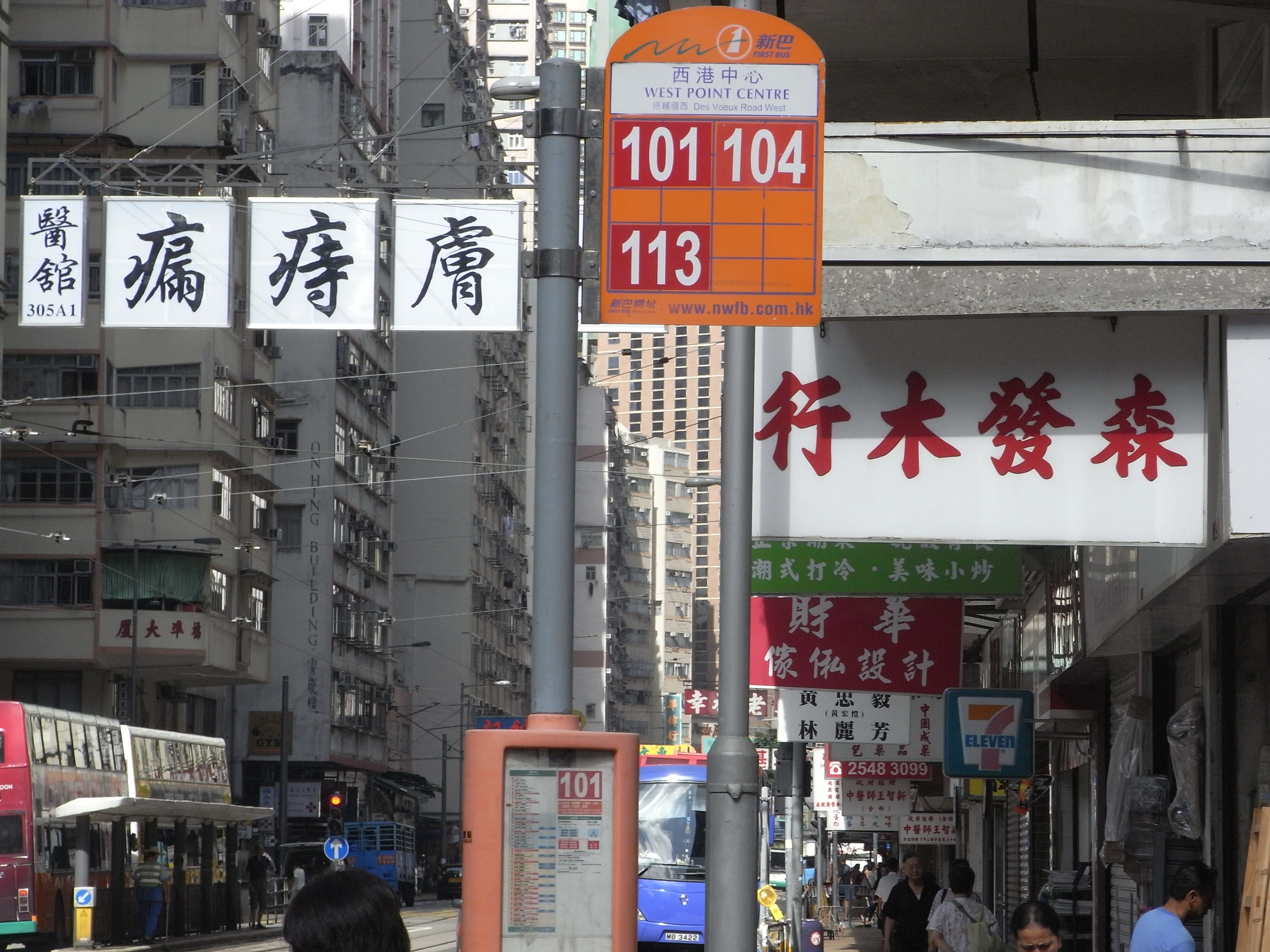 西營盤西港中心巴士站